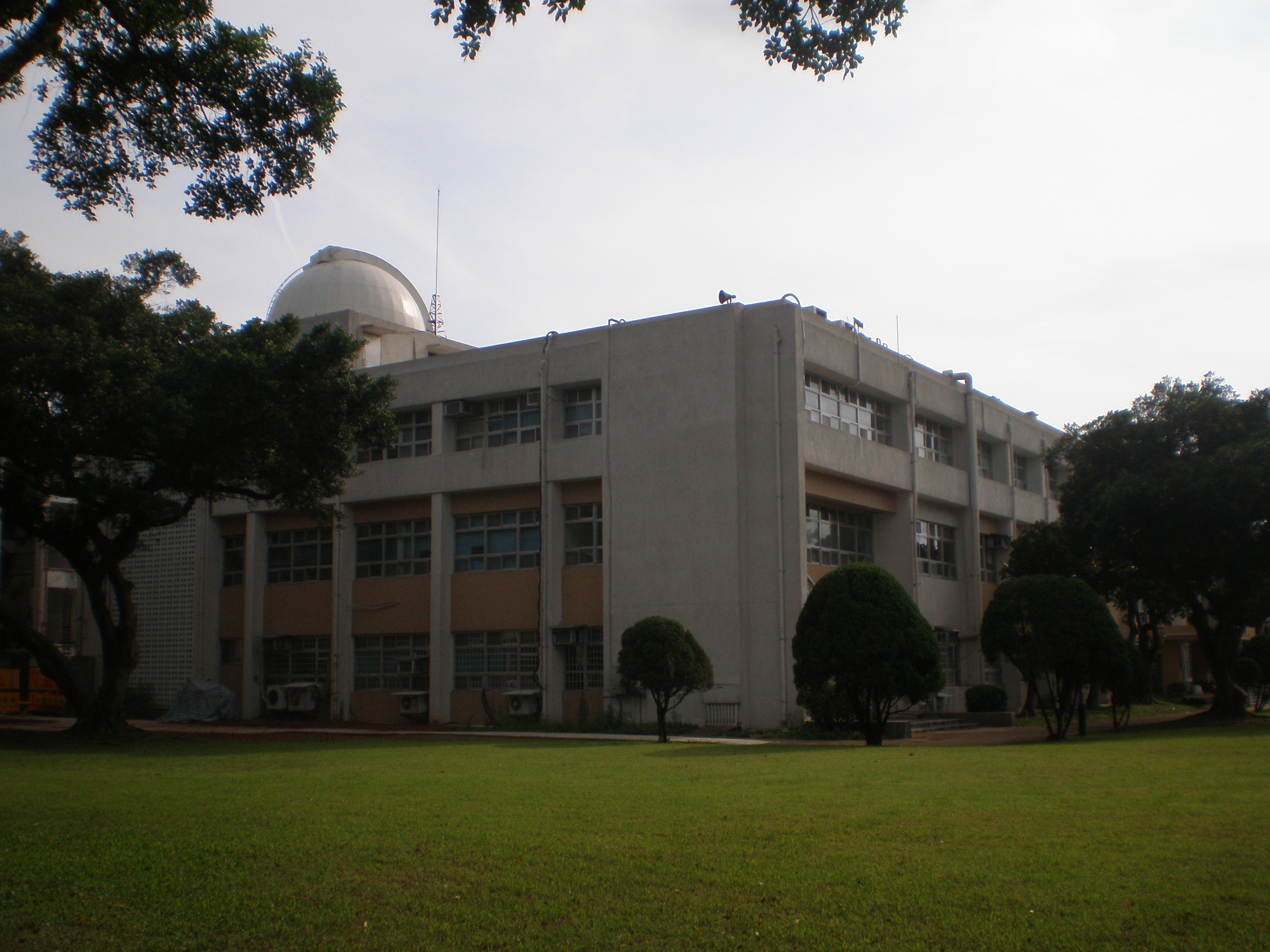 中文（台灣）: 國立中央大學科學一館。